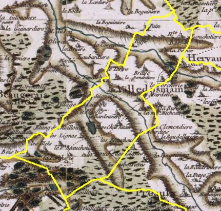 Villedômain sur la carte de Cassini. Les limites communales modernes figurent en jaune.